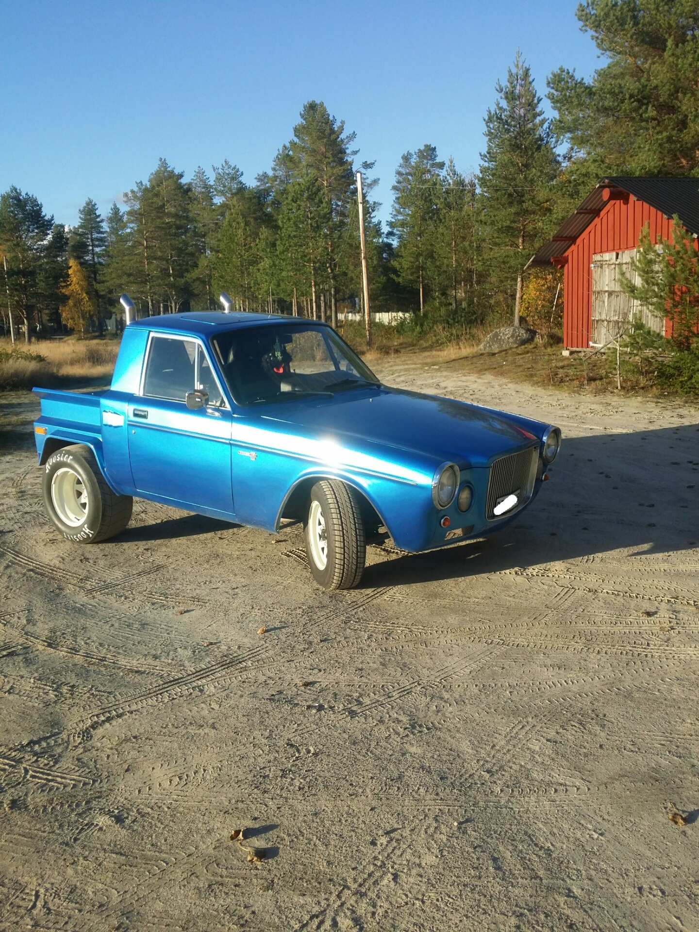 The only 164 EPA-tractor in Sweden.